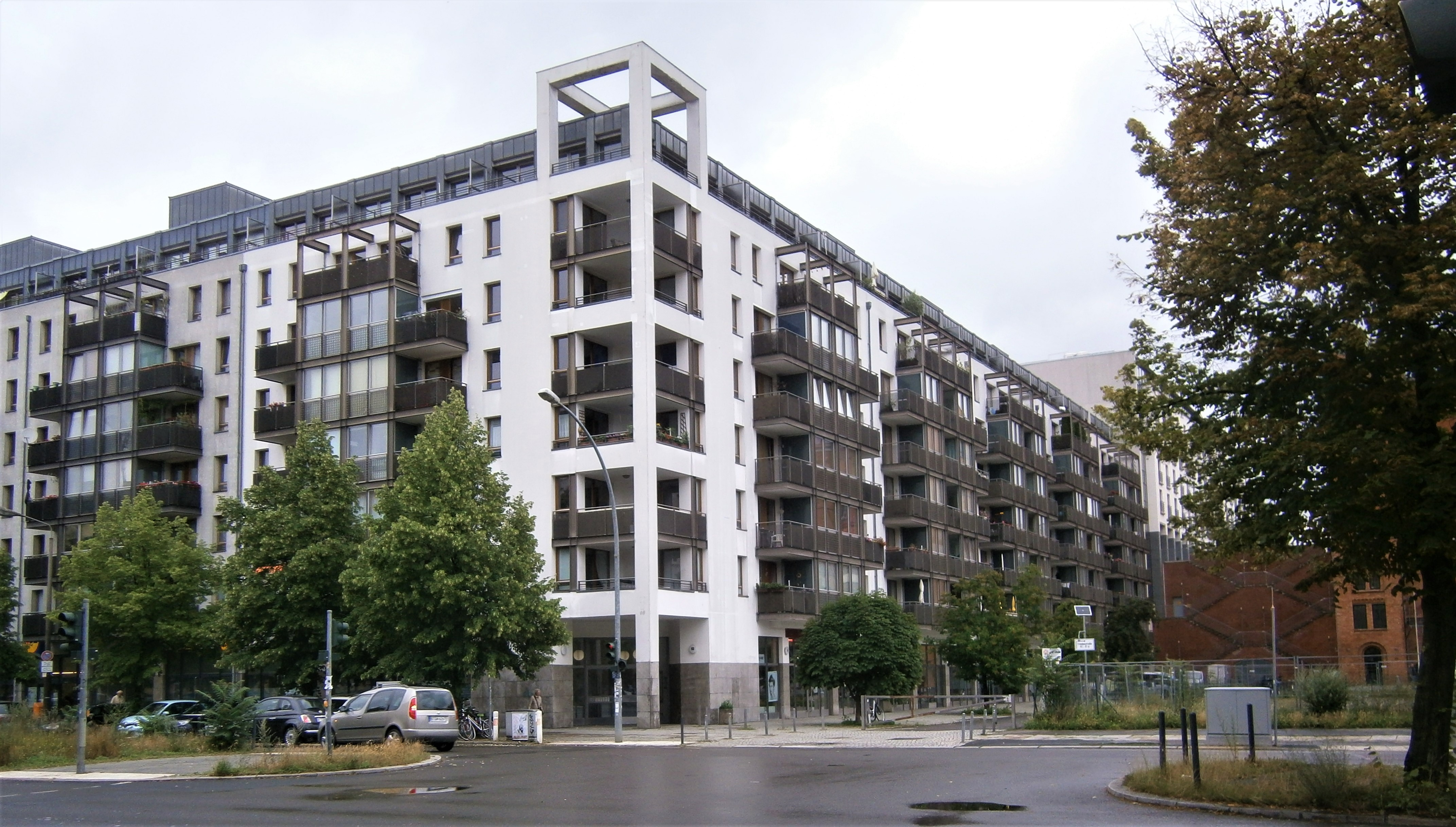 Die Friedenstraße ist eine Straße im Berliner Bezirk Friedrichshain-Kreuzberg, Ortsteil Friedrichshain. Angelegt und benannt wurde sie 1871-1876 auf dem Communicationsweg außerhalb der abgerissenen Berliner Zollmauer. Bereits seit dem Anlegen und der Bebauung bestand eine Teilung der Straße auf Königstadt und Stralauer Viertel. Aktuell sind es drei unterschiedene Straßenabschnitte: regionale Straßenverbindung im Barnimkiez am Volkspark Friedrichshain, am Platz der Vereinten Nationen als Parkzone, südlich im (Planungsraum) "Friedenstraße" als Ergänzungsstraße. Im Bild das nach 2010 erbaute Neubauhaus mit Eigentumswohnungen, Friedenstraße 94, 94a, 95 an der Straßenfront und rechtwinklig mit 93 und 92—92c abgesetzt.